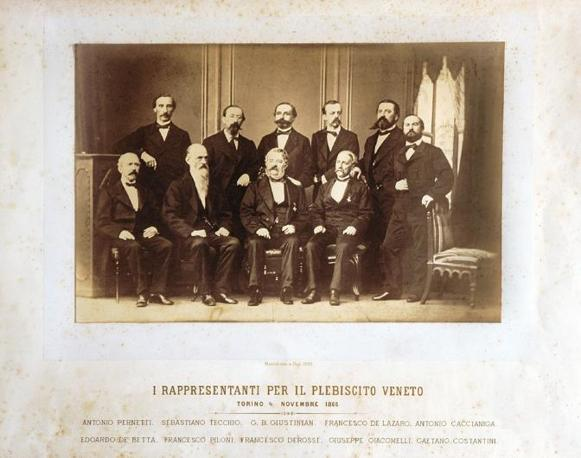 I rappresentanti per il plebiscito veneto del 21-22 ottobre 1866 per l'annessione al Regno d'Italia: Seduti (da sinistra a destra): Antonio Pernetti, Sebastiano Tecchio, Giambattista Giustinian, Francesco De Lazaro In piedi: Edoardo De Betta, Francesco Piloni, Francesco Derossi, Giuseppe Giacomelli, Gaetano Costantini, Antonio Caccianiga